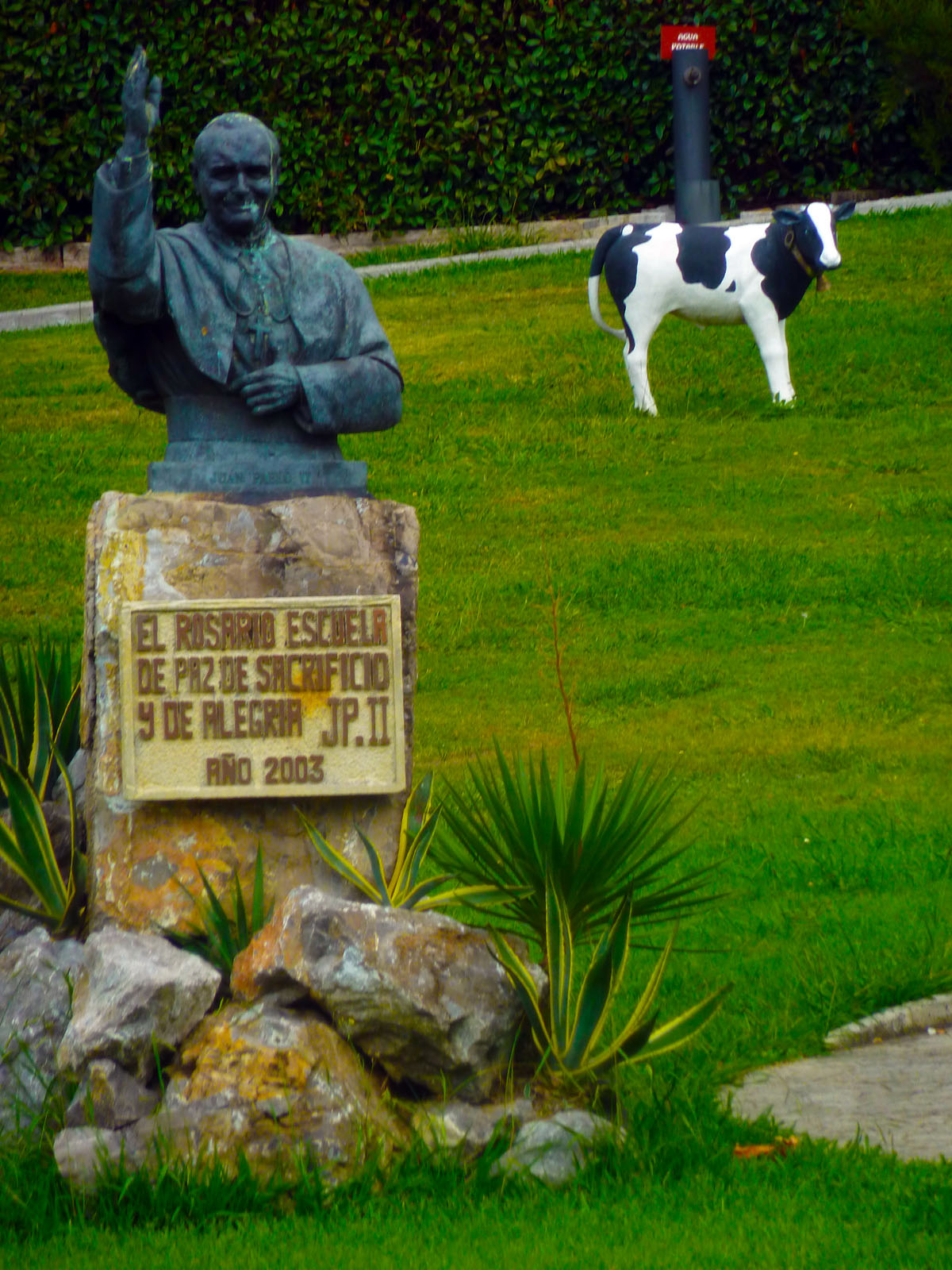 Naranco. Oviedo